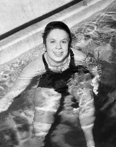 Elena Zennaro